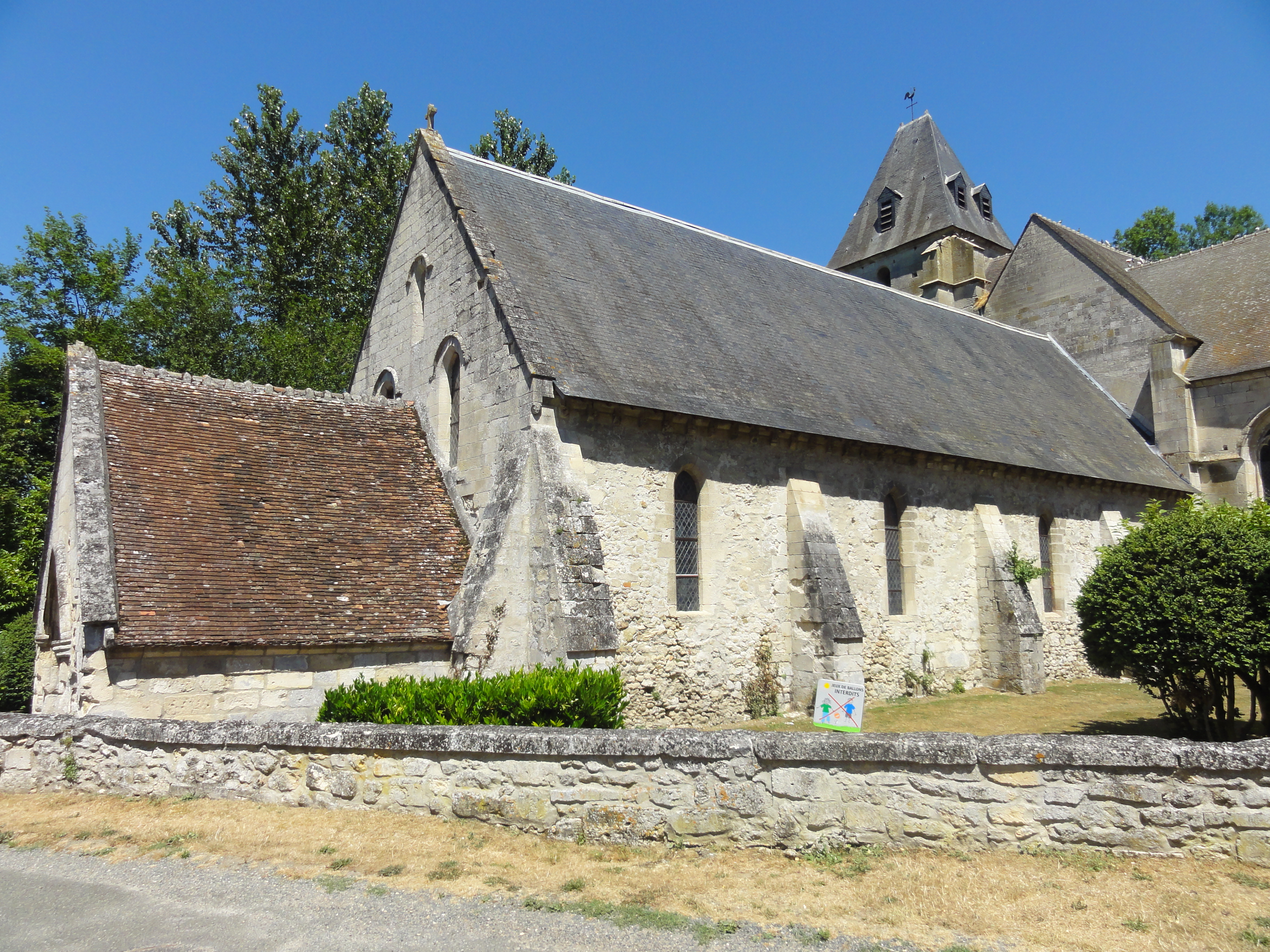 Voir titre.